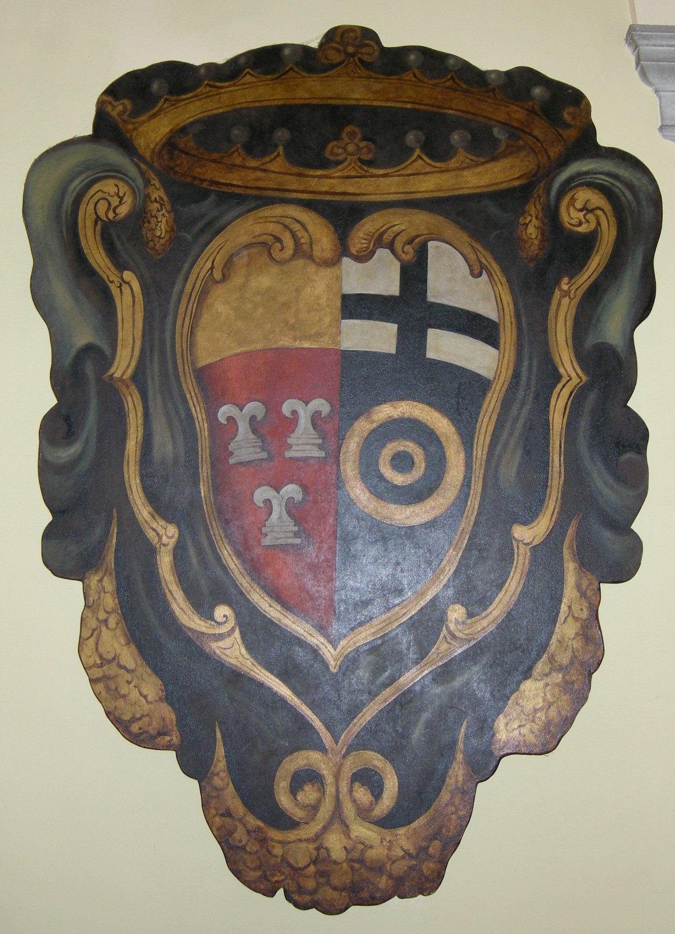 Palazzo frescobaldi, passaggio 04, stemma frescobaldi e albizi